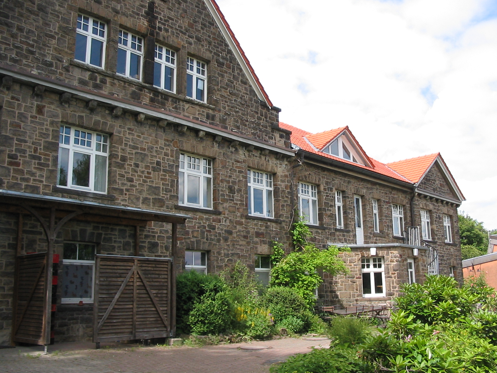 Institut für Waldorf-Pädagogik, Witten-Annen: Altbau; bis 1974 Evangelisches Jugenderholungslandheim Annener Berg